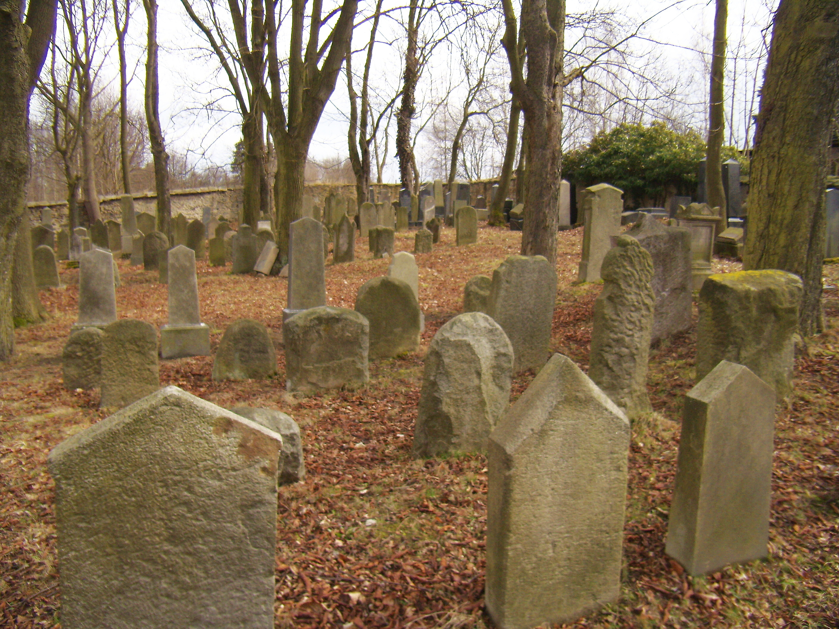 Tachov 01 starý ŽH